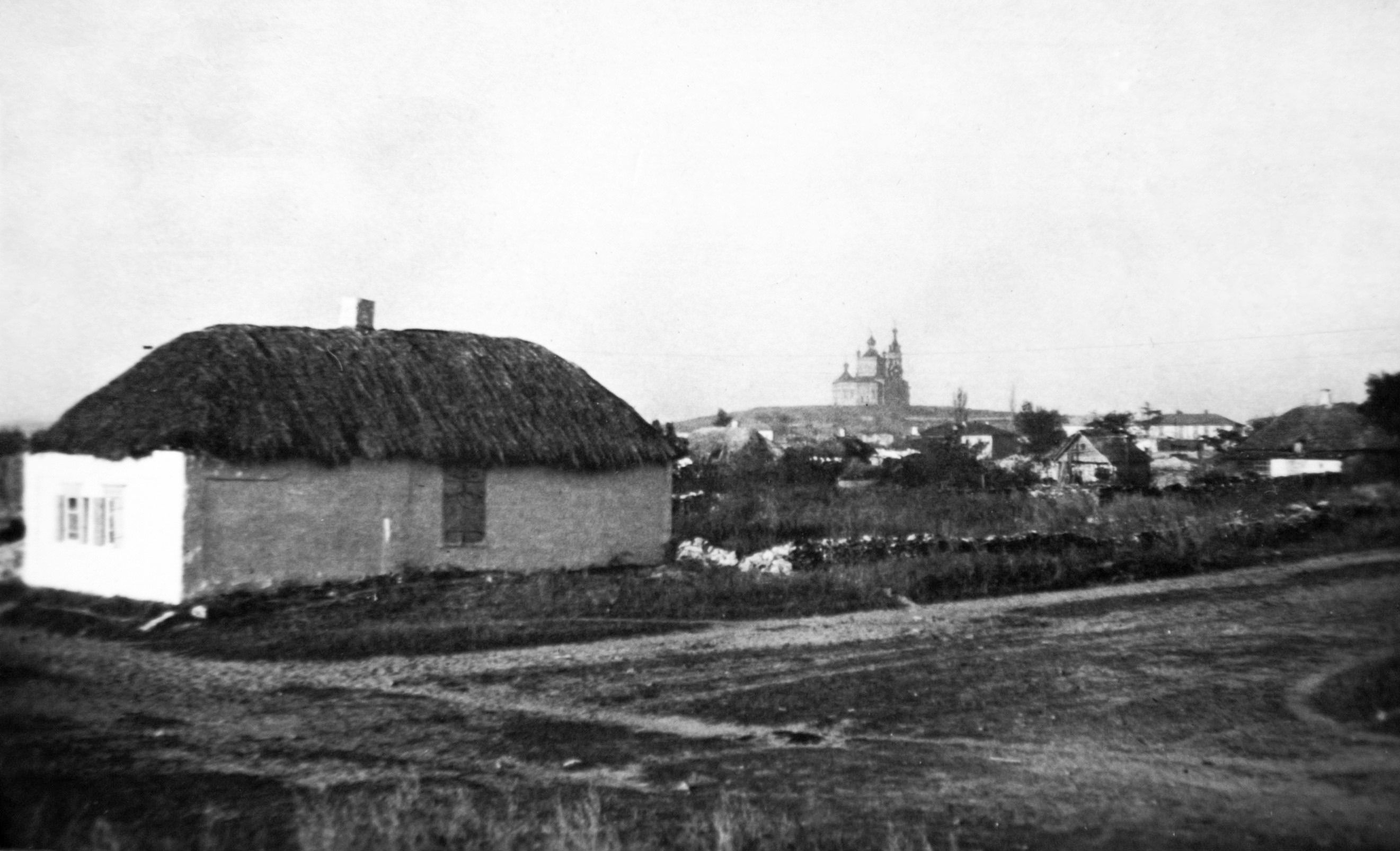 Ростовская область Станица Мешковская Покровская церковь